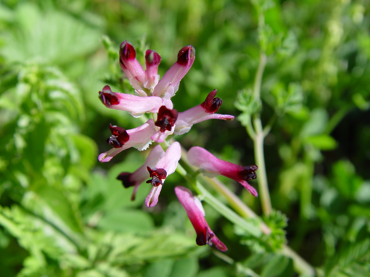 Name Fumaria officinalis Familiy Fumariaceae